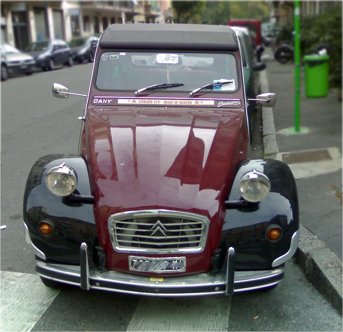 citroen 2 cv charleston